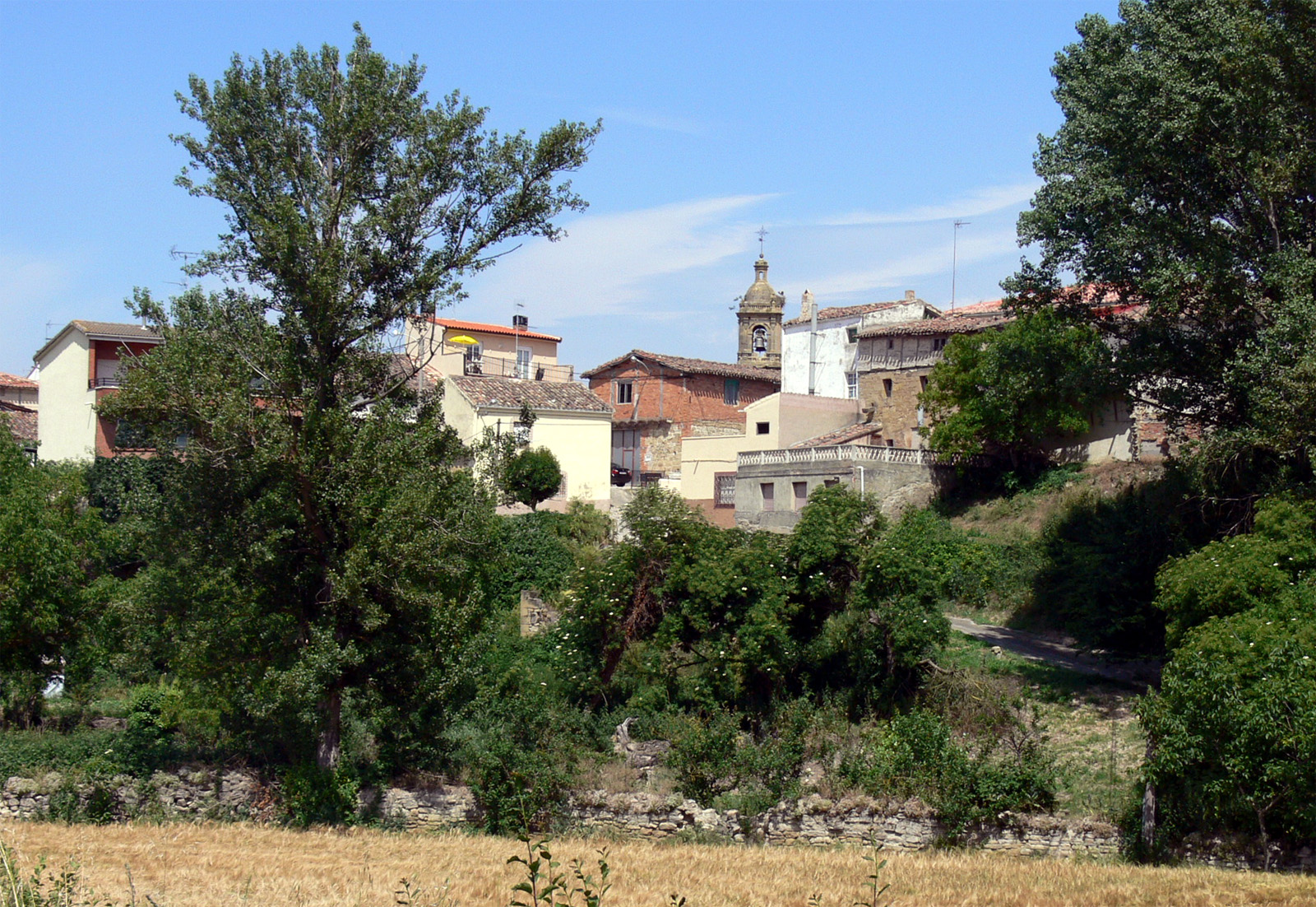 Tormantos. municipio de La Rioja (España)